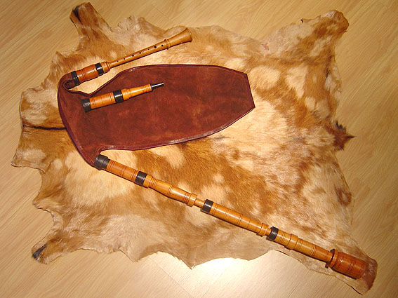 Gaita transmontana, construída em peá-marfim. De minha autoria, para uso na Wikipédia desde que citada a fonte.